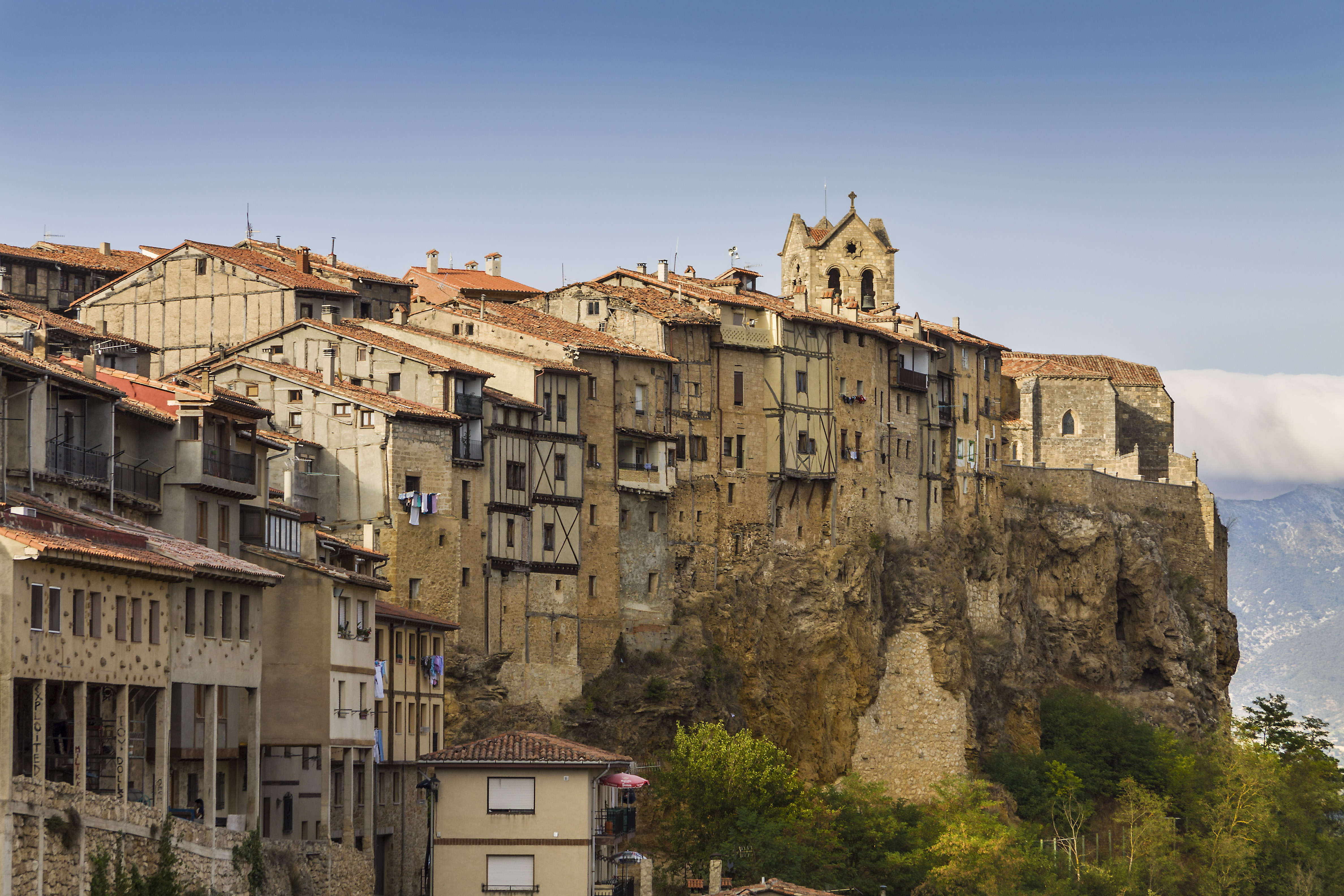 Vista de la población burgalesa de Frías